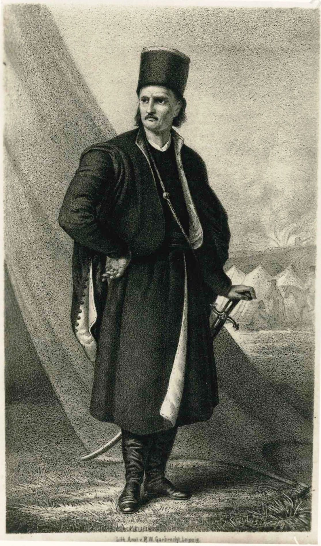 Tudor Vladimirescu, revolutionary